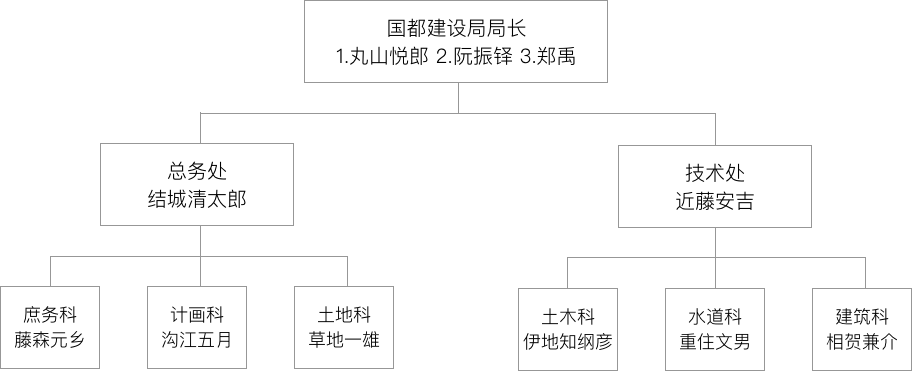 1930年代满洲国新京（现长春）首都规划局组织架构。来源：越泽明（越沢明）.《伪满洲国首都规划》